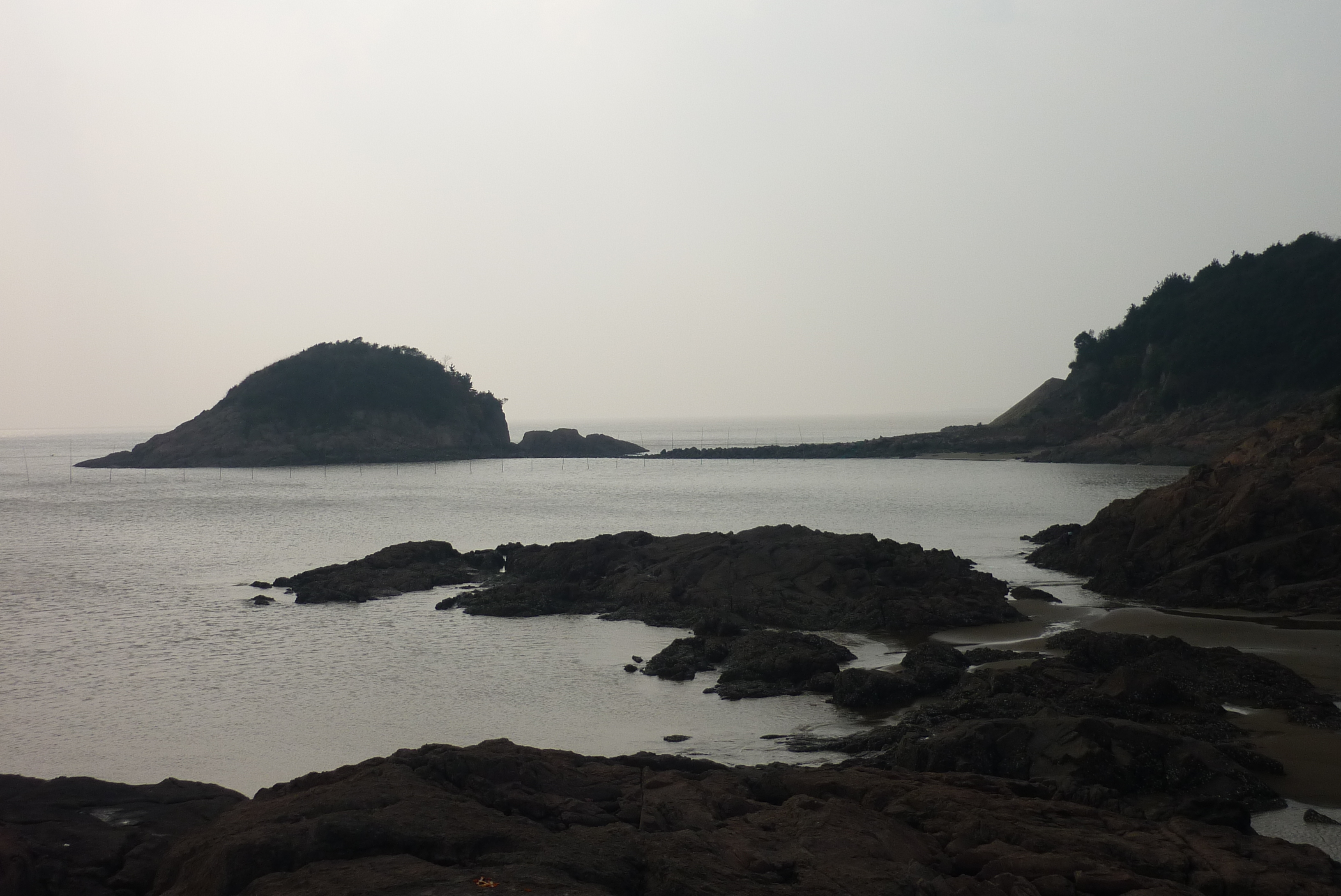 北仑洋沙山